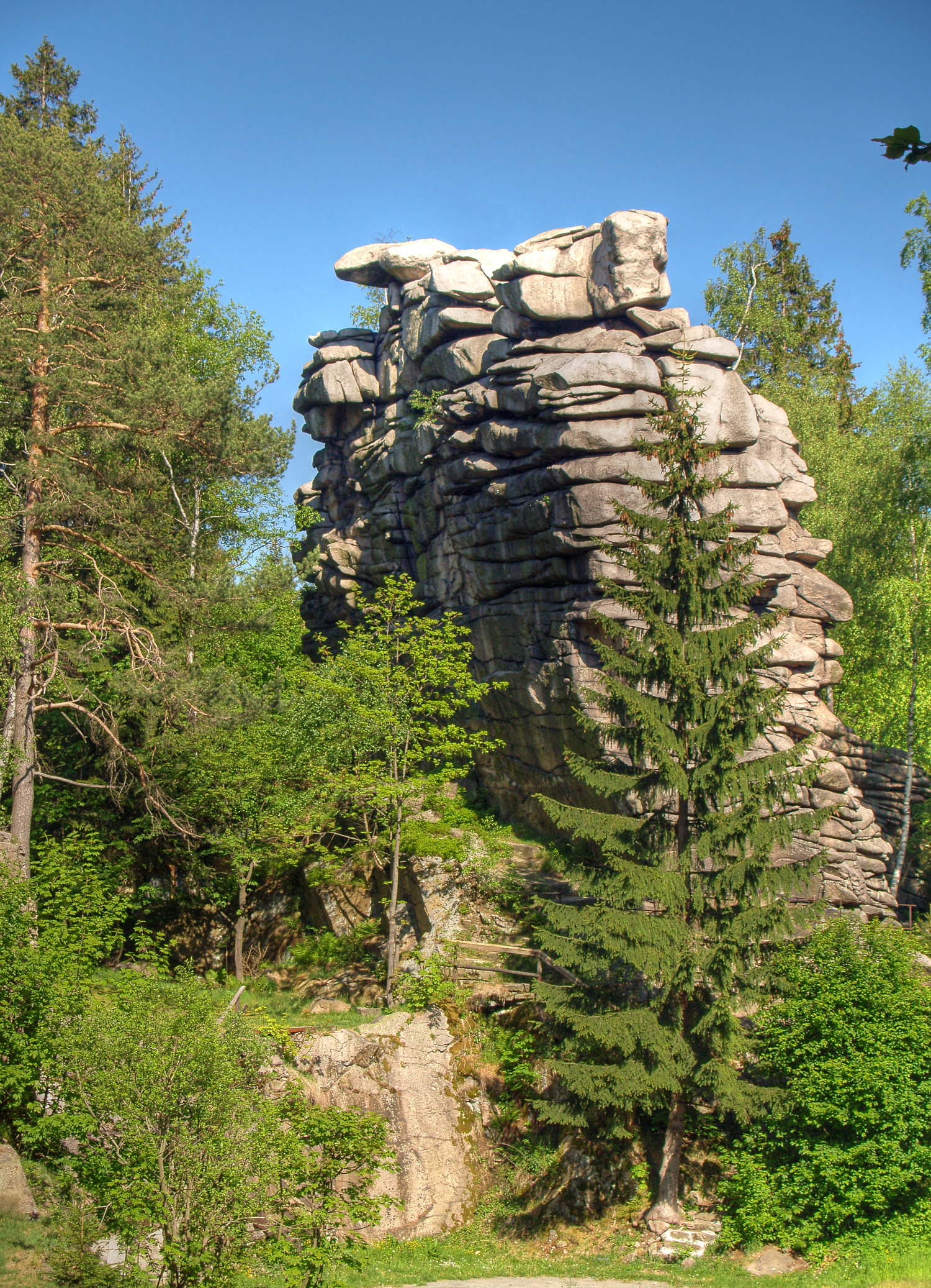 Greifensteine bei Ehrenfriedersdorf, Sachsen